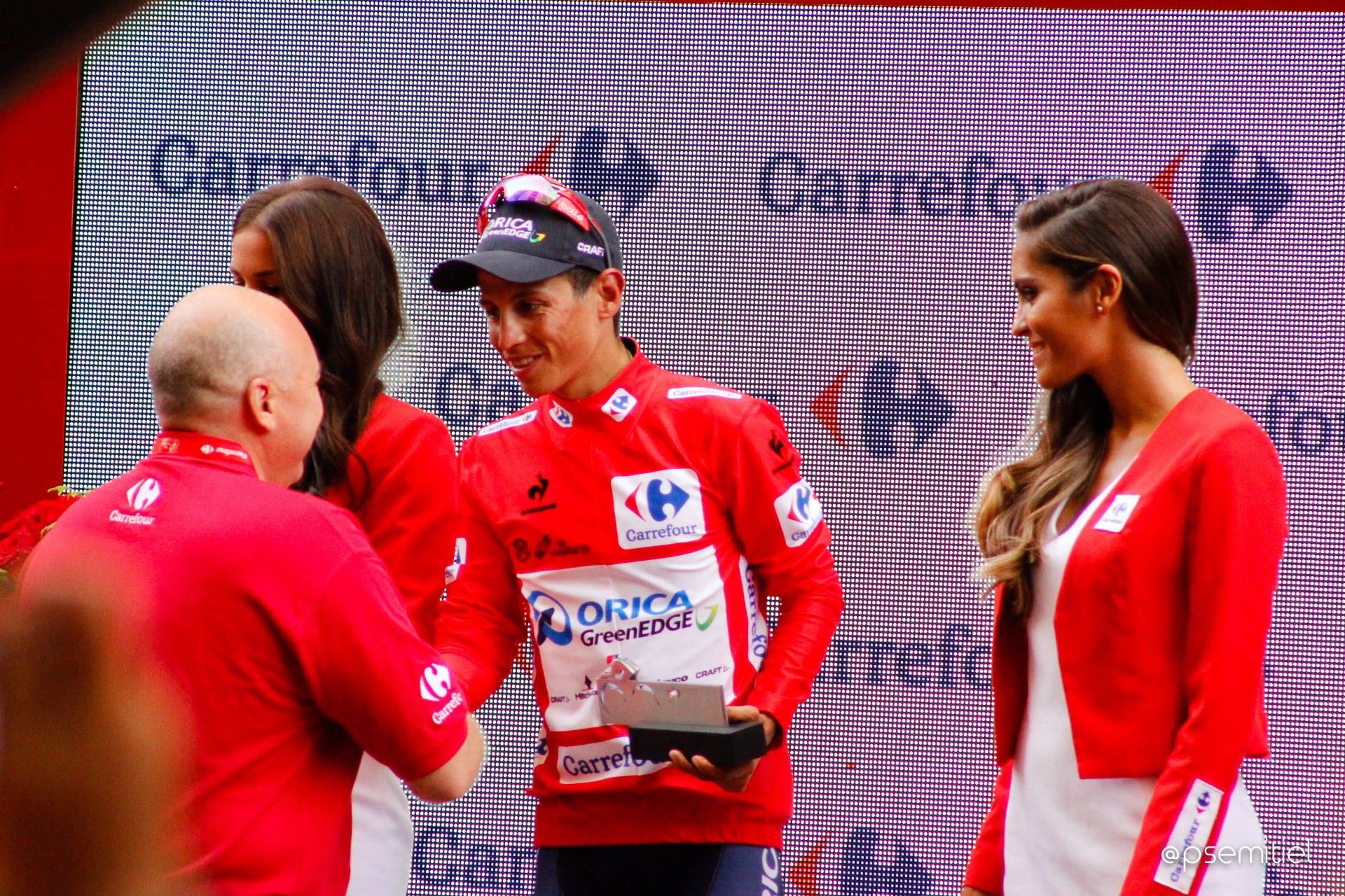 Vuelta a España 2015 | 8ª Etapa Puebla de Don Fadrique - Murcia-93